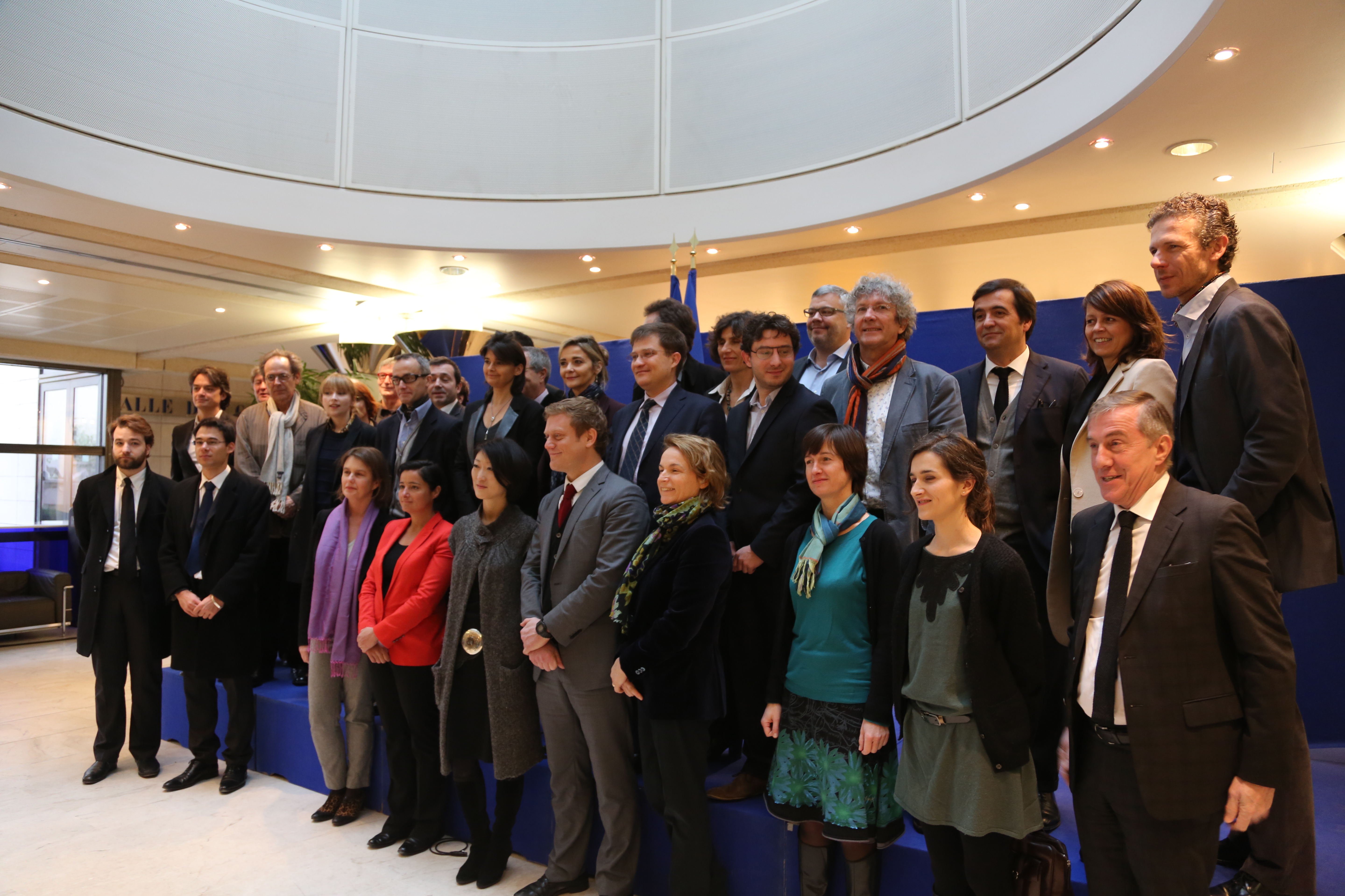 Membres du Conseil National du Numérique placé sous la responsabilité de la ministre déléguée chargée des PME, de l'Innovation et de l'Économie numérique Fleur Pellerin, composé le 18 janvier 2013